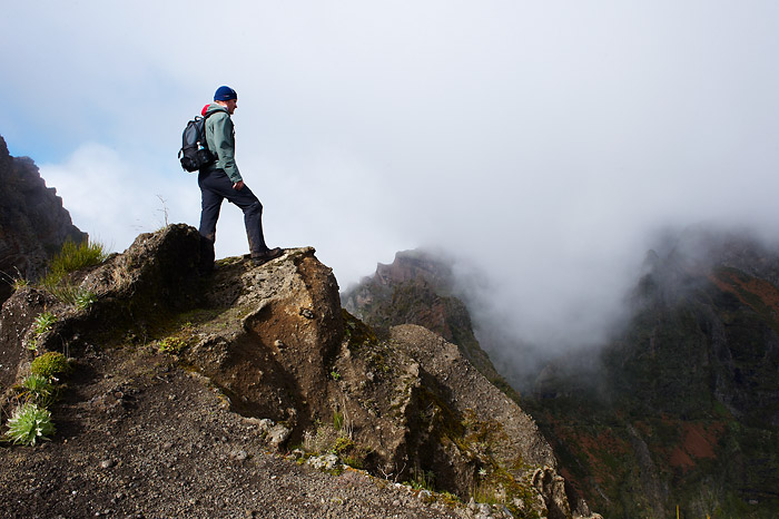 Sven Začek Madeiral.